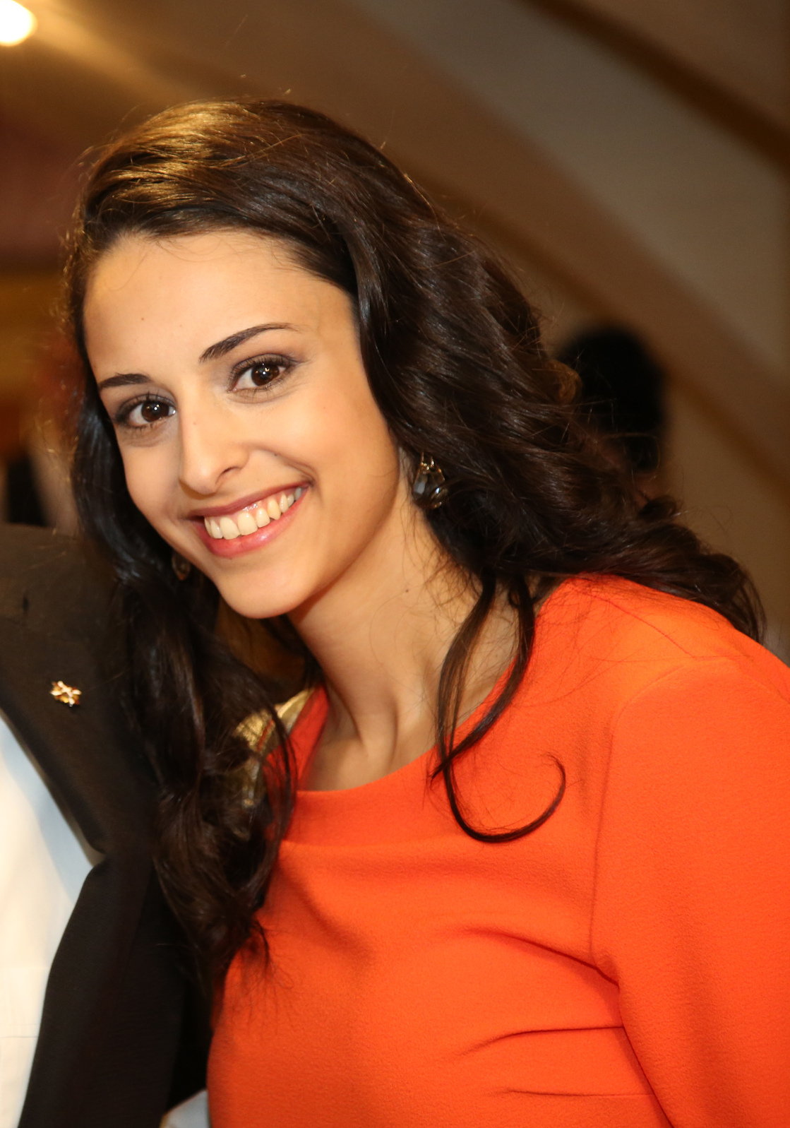 Nuredini_Aki,Fahima-Hila-3457